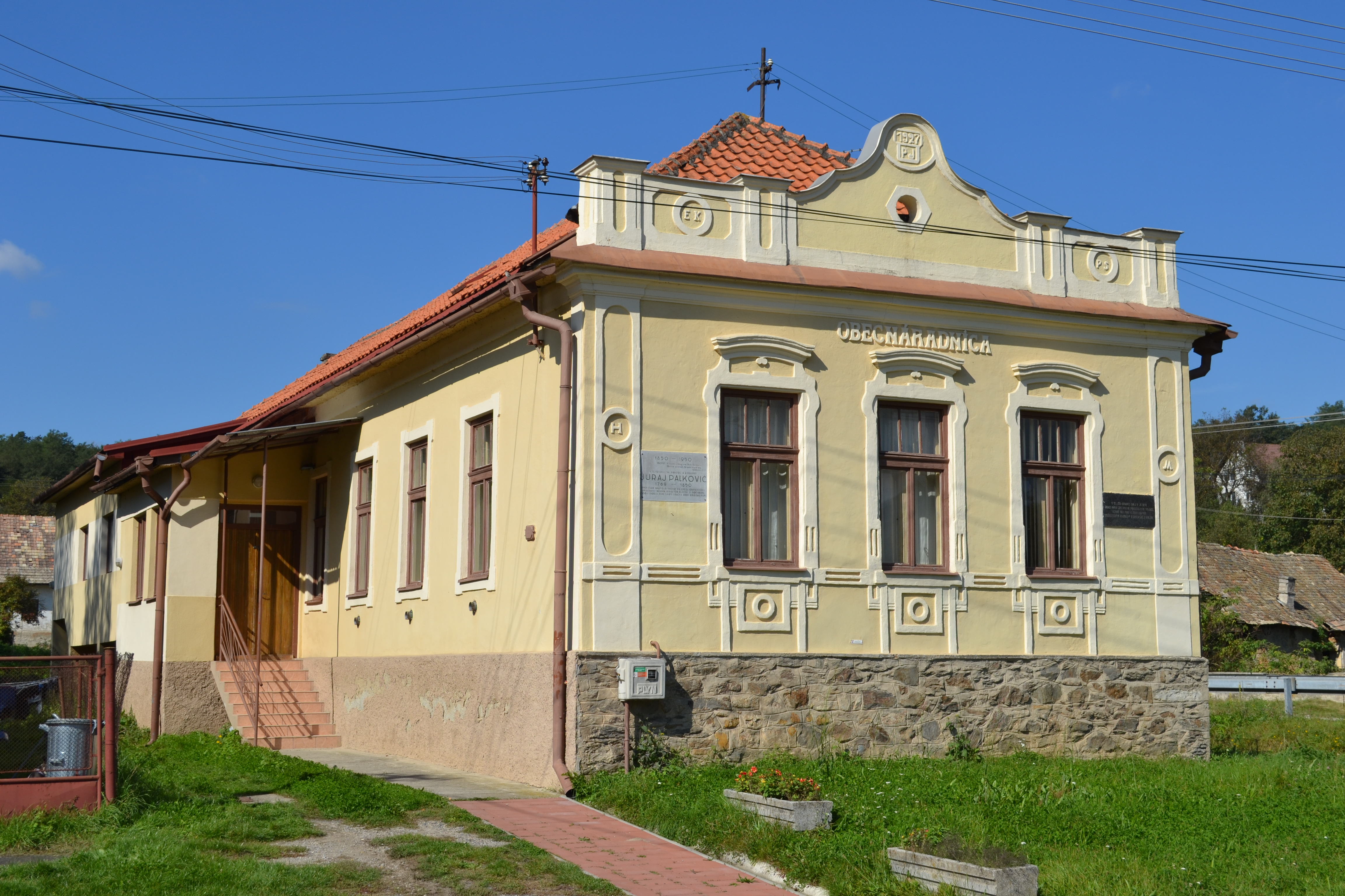 Pamätný dom č. 36 v Rimavskej Bani